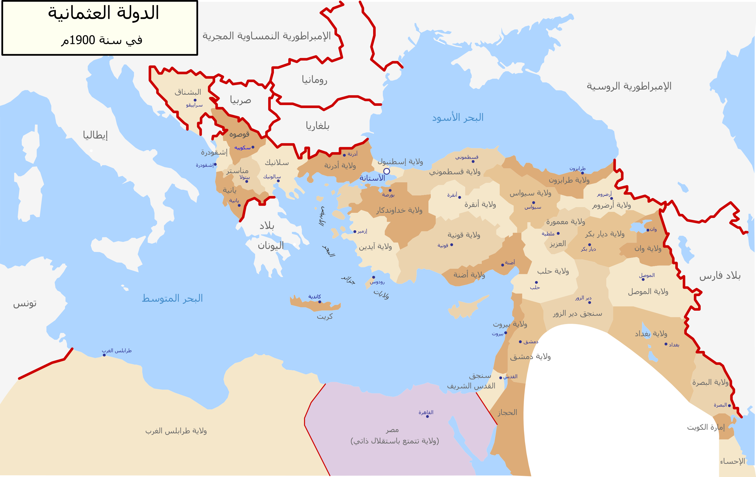 خارطة تظهر التقسيم الإداري للدولة العثمانية سنة 1900 باللغة العربية